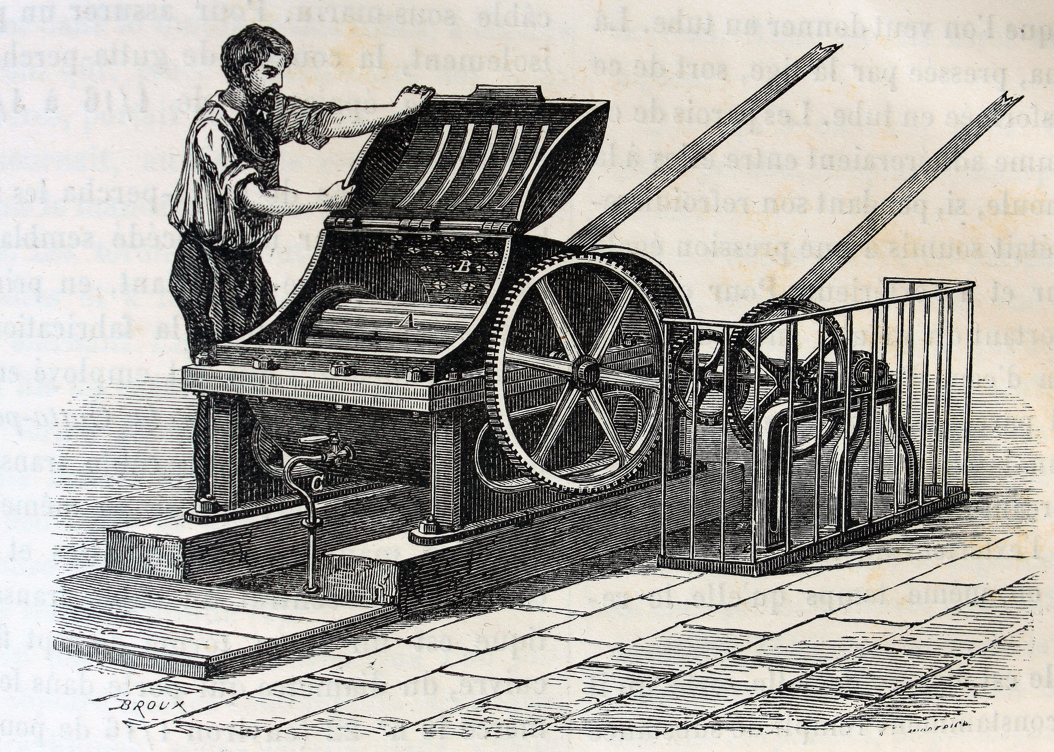 Ilustraciones de la obra : Les merveilles de l'industrie ou, Description des principales industries modernes / par Louis Figuier. - Paris : Furne, Jouvet, [1873-1877]. - Tome II